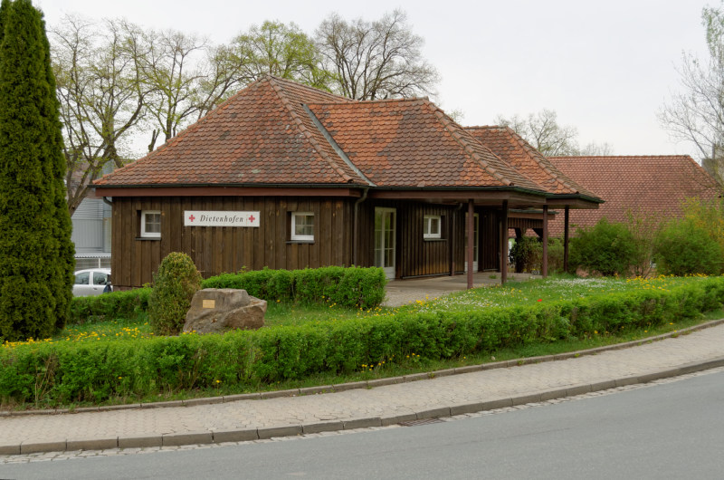 Ehemaliger Bahnhof Dietenhofen in Blickrichtung Nordosten an der ehemaligen Bibertbahn